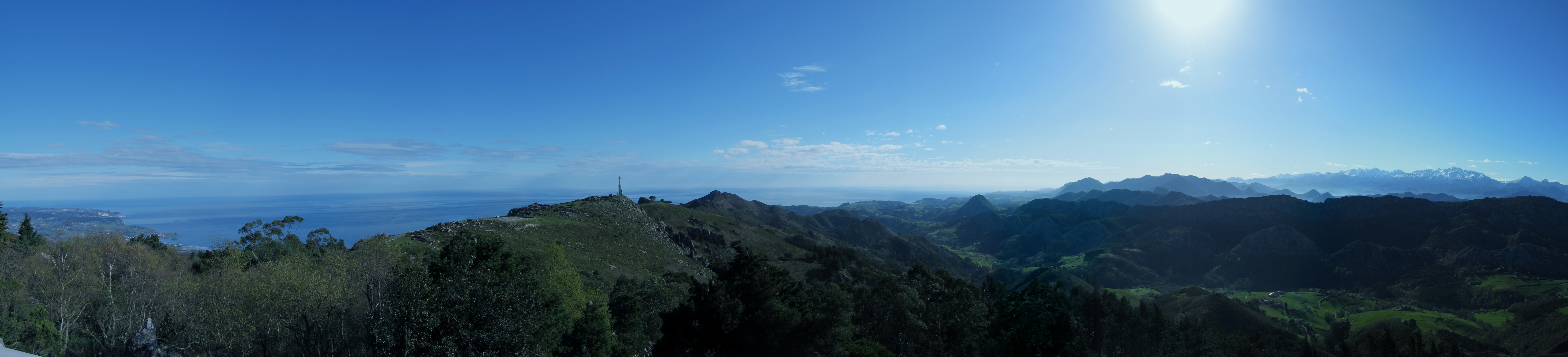 Panorámica del Pico Pienzu, Asturias (Spain)